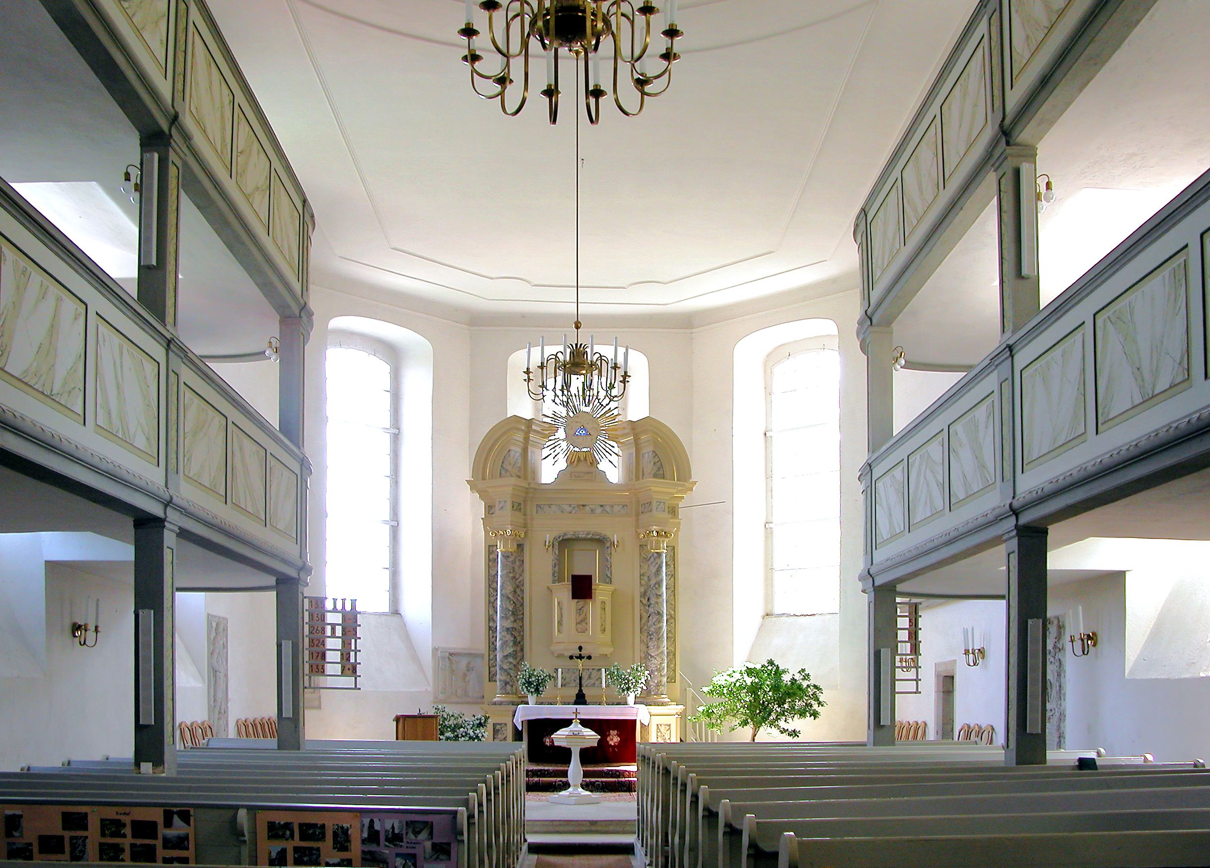 12.06.2003 01665 Zehren (Diera-Zehren): St. Michaelis, Bergstraße 11 (GMP: 51.199924,13.404187). Schon 1316 wird erstmals eine Kapelle erwähnt, die dem Heiligen Michael geweiht ist. Sie wurde 1545 abgerissen. Die heutige St. Michaeliskirche wurde 1756-1775 erbaut. Kanzelaltar mit Gottesauge, Symbol der Dreieinigkeit Gottes, dem Gottesauge in der Wolke mit Strahlenkranz. [DSCN]20030612120DR.JPG(c)Blobelt